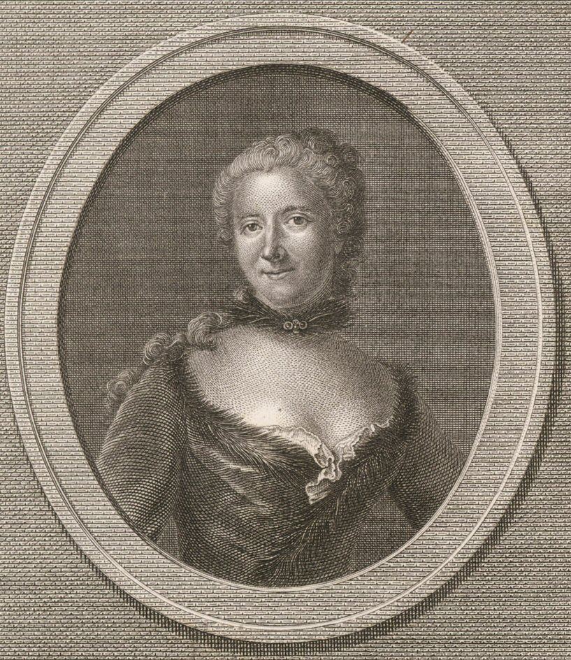 Portrait of Emilie du Châtelet (1706-1749)